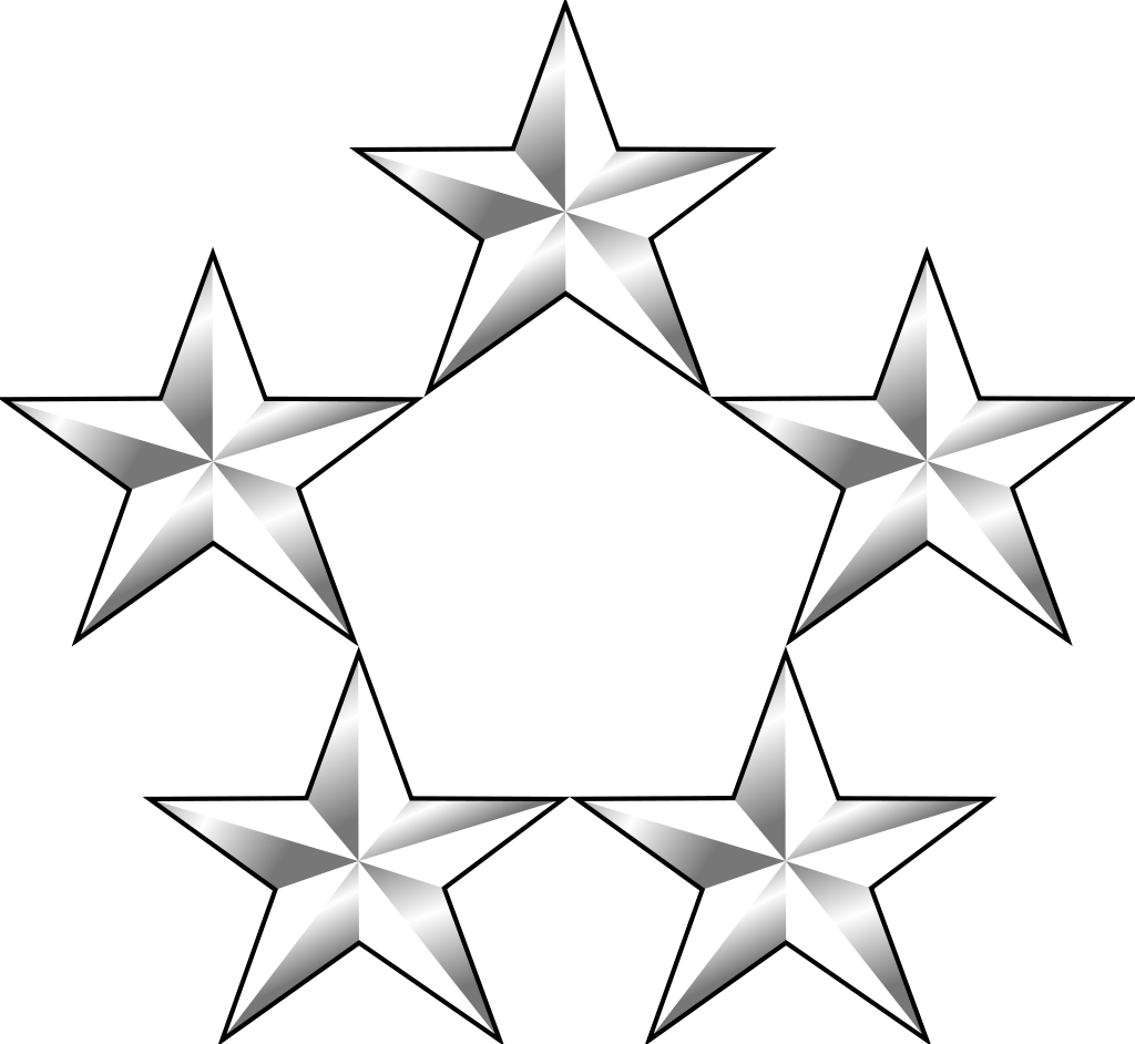 Insigne cinq étoiles général de l'US AIR FORCE